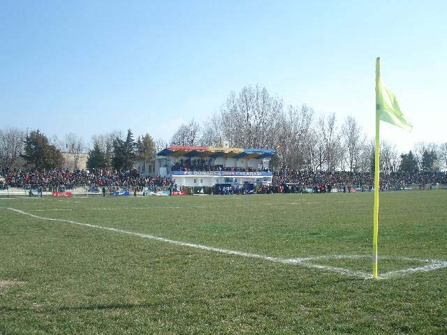 Stadion Dunarea